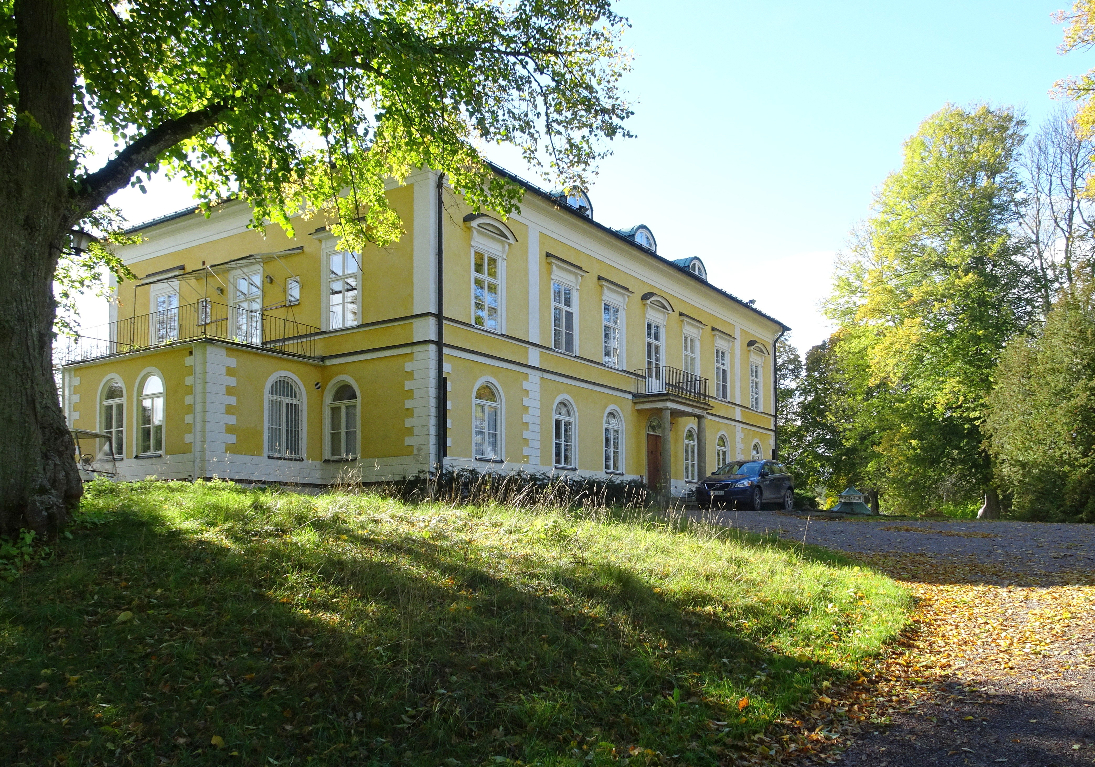 Nynäs gård huvudbyggnad, arkitekt Fredrik Blom